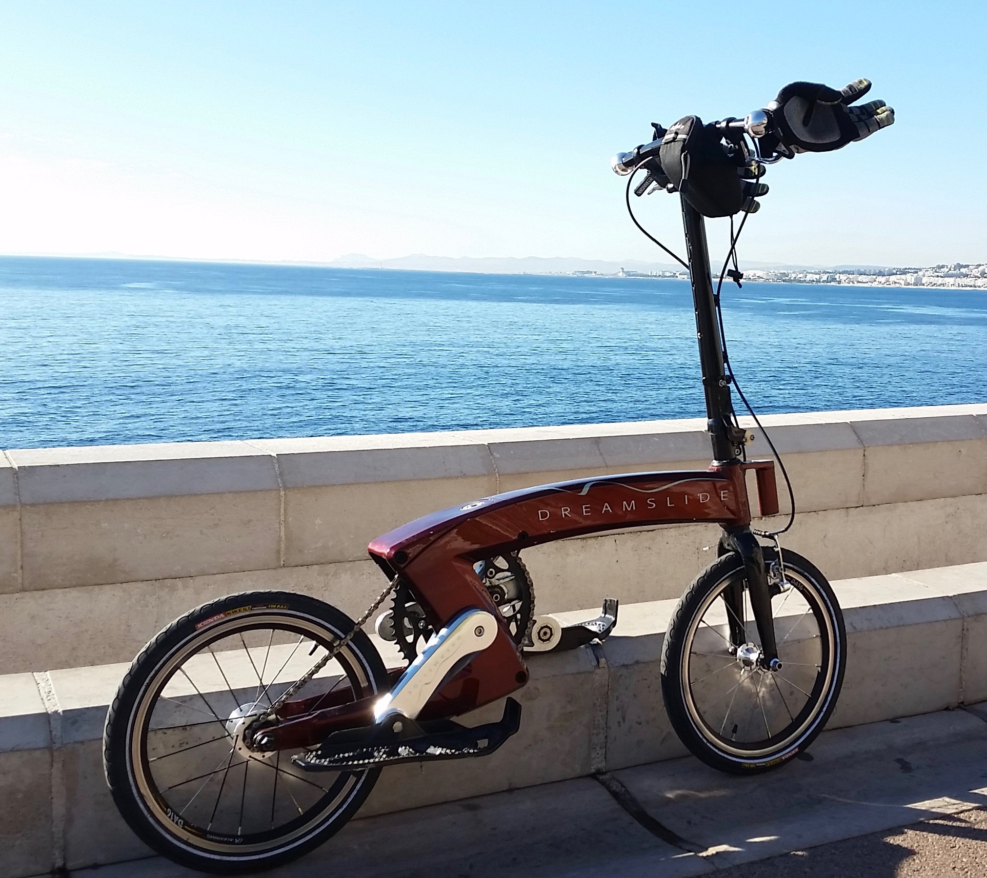 Vélo Dreamslide, particularité il reproduit le mouvement de la marche